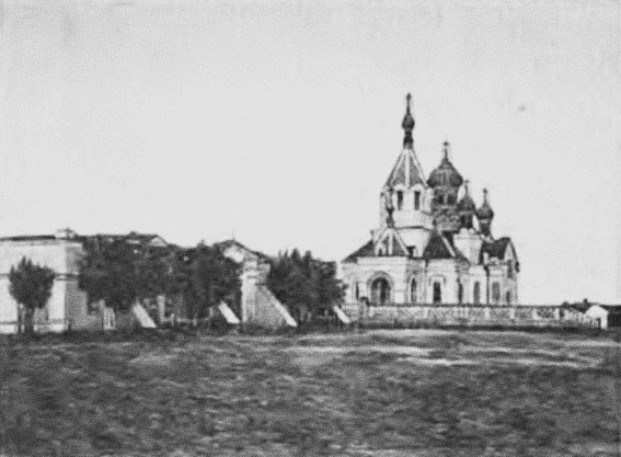 Беларуская (тарашкевіца): Паставы (Pastavy), пляц Стары Рынак (plac Stary Rynak) у бок вуліцы Лучайскай (vulica Łučajskaja). Царква-мураўёўка